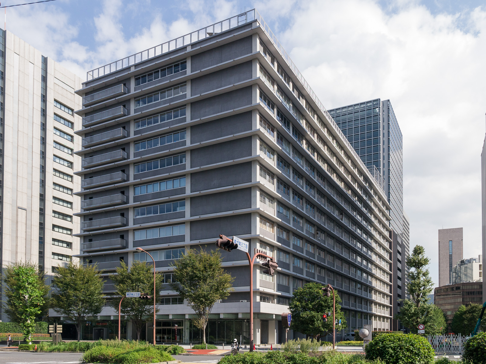 日本郵便本社ビル、旧郵政省。東京都千代田区霞が関。